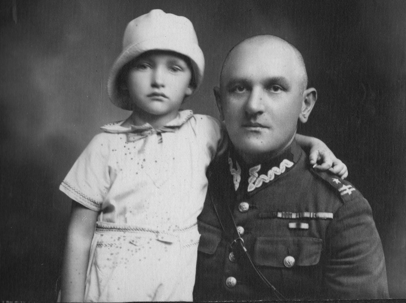 Stanisław Zaucha z synem Januszem Wilno 1931r